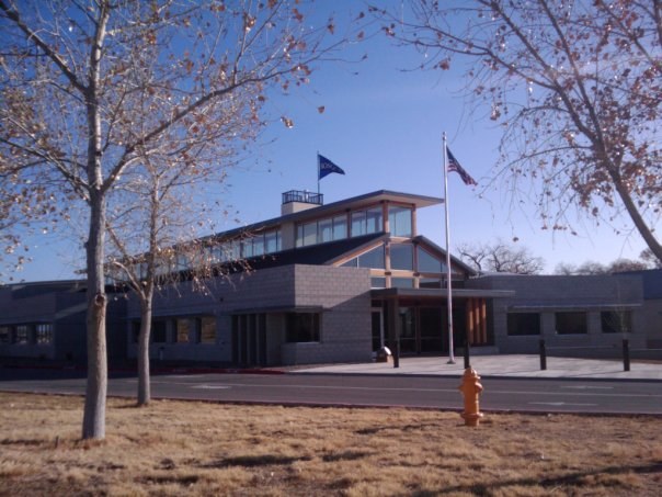 Bosque School, Albuquerque, NM